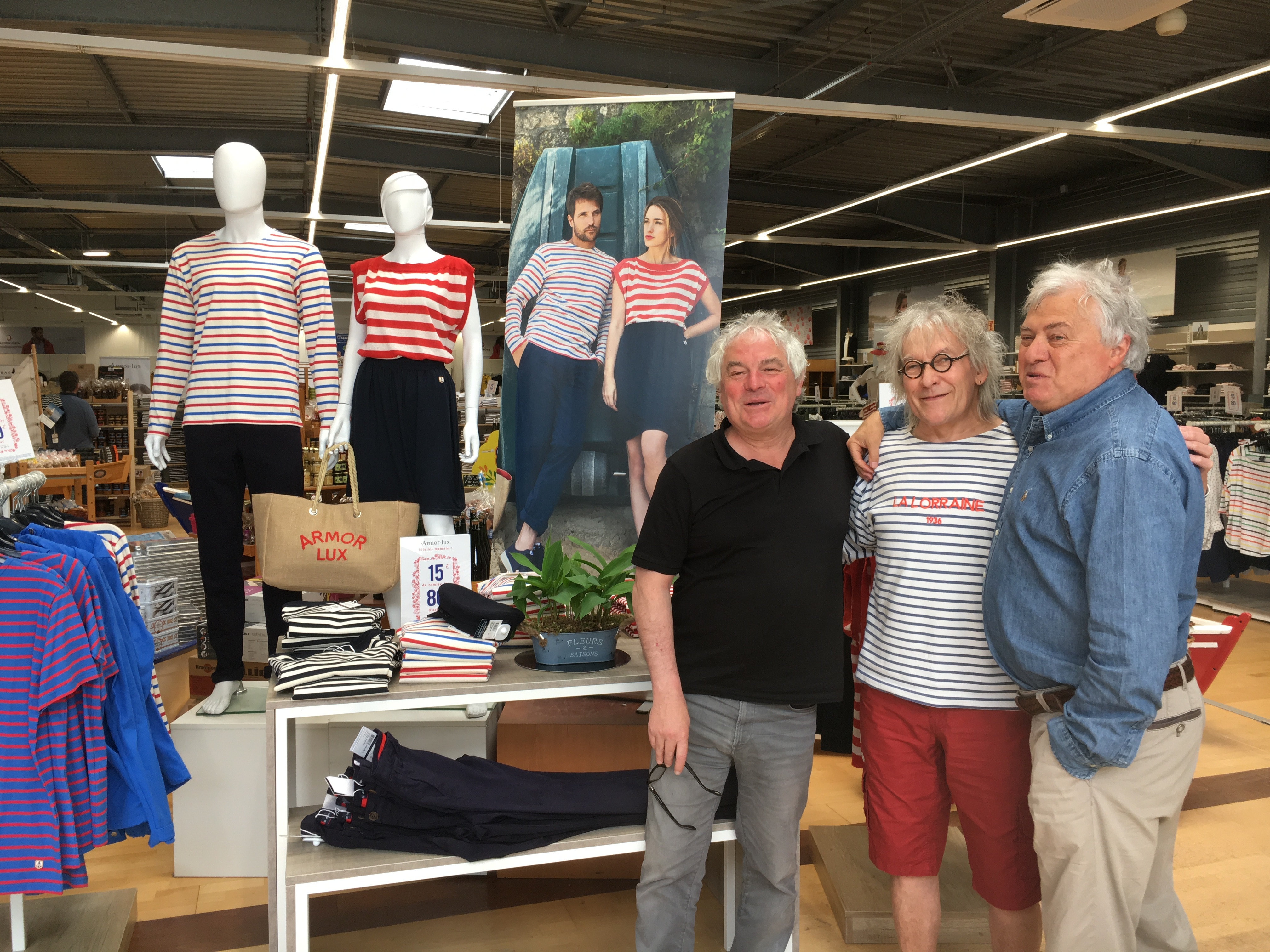 Jean-Louis Jossic (au centre), chanteur de Tri Yann, en compagnie de Jean-Guy Le Floch, président et Michel Gueguen directeur général, au magasin Armor-Lux de Kerdroniou à Quimper, le 20 mai 2019.